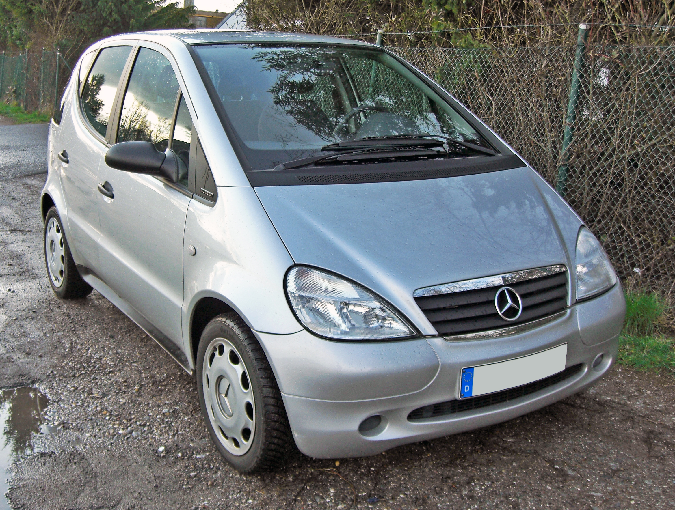 Mercedes A 140 Classic Fun